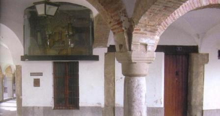 Arquillo del pan